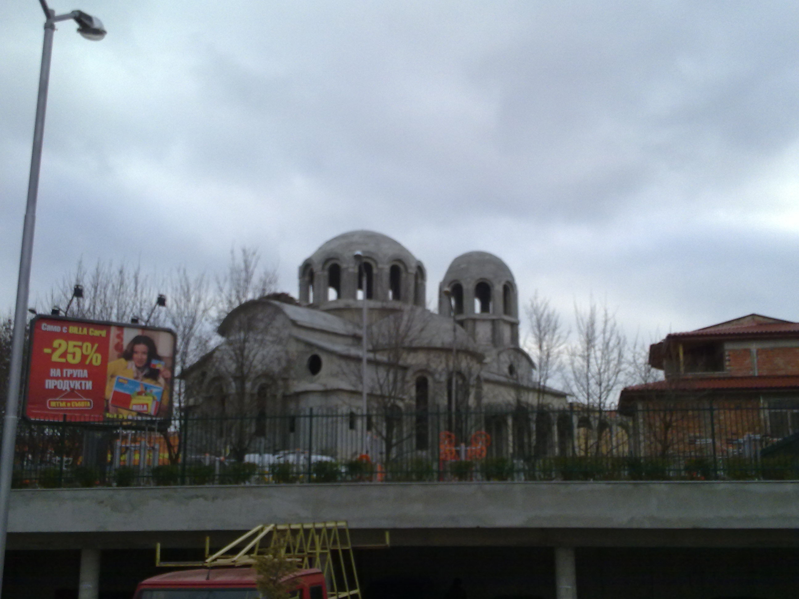 Burgas, Bulgarien: Die Kirche St. Nikolai im Bau im Stadtviertel Meden Rudnik, Dez. 2011 (bulg. Св. Николай Чудотворец)